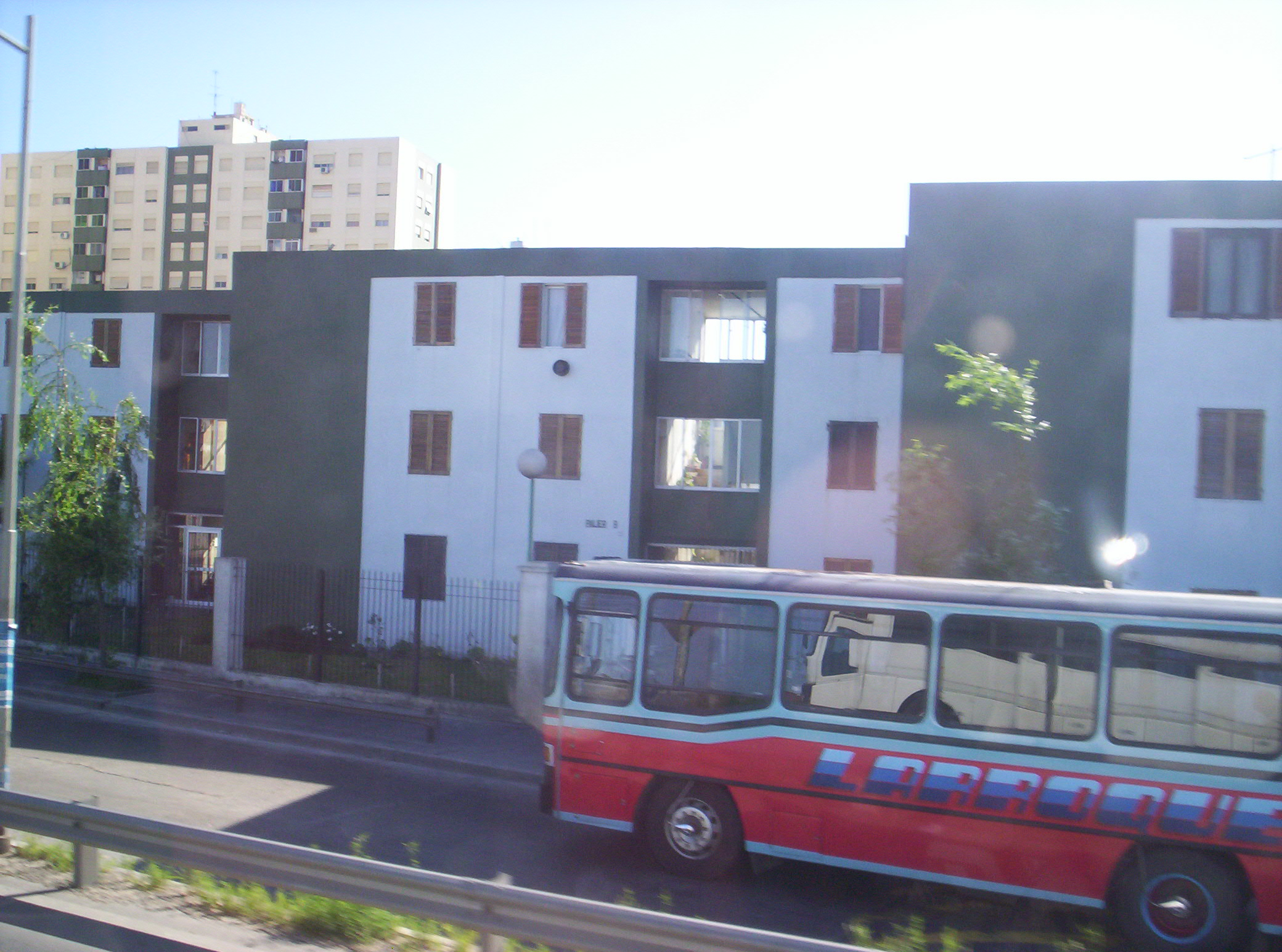 Camino Negro y Martìn Rodríguez, Colectivo 548